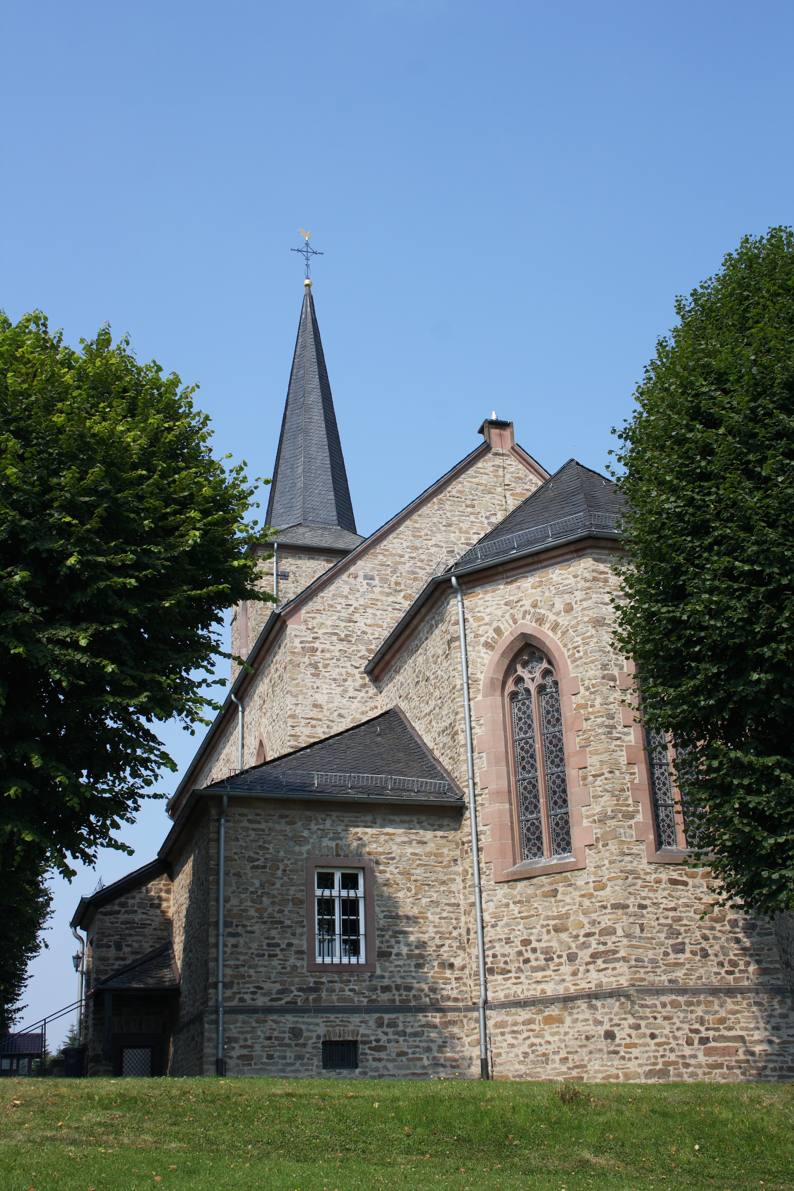 katholische Pfarrkirche St. Stephan in Effelsberg, einem Ortsteil von Bad Münstereifel im Kreis Euskirchen (Nordrhein-Westfalen)